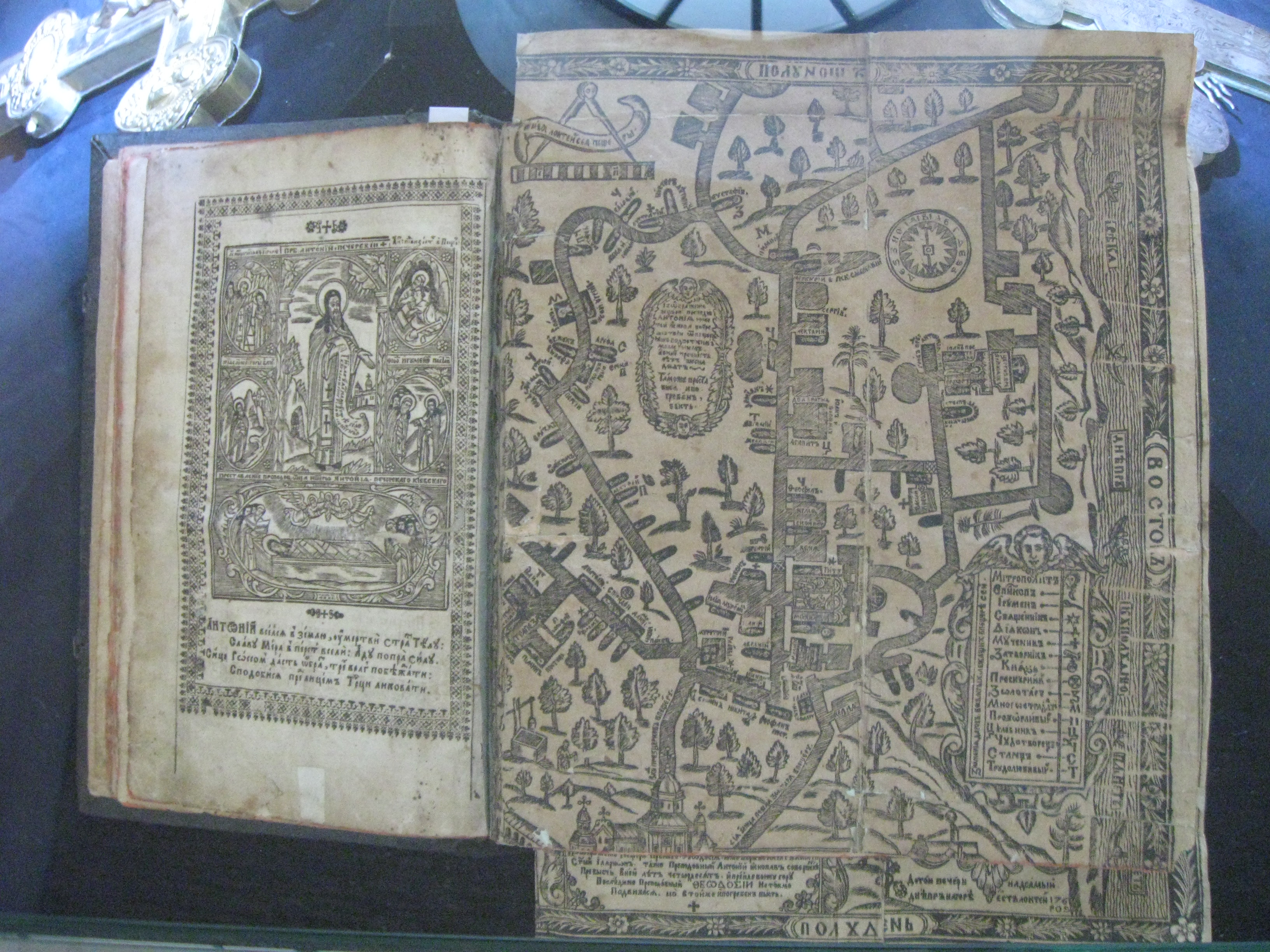 Патерик Києво-Печерський. Друкарня Києво-Печерської лаври. 1678 р. Виставка "Велике і Величне". Мистецький арсенал. 2013